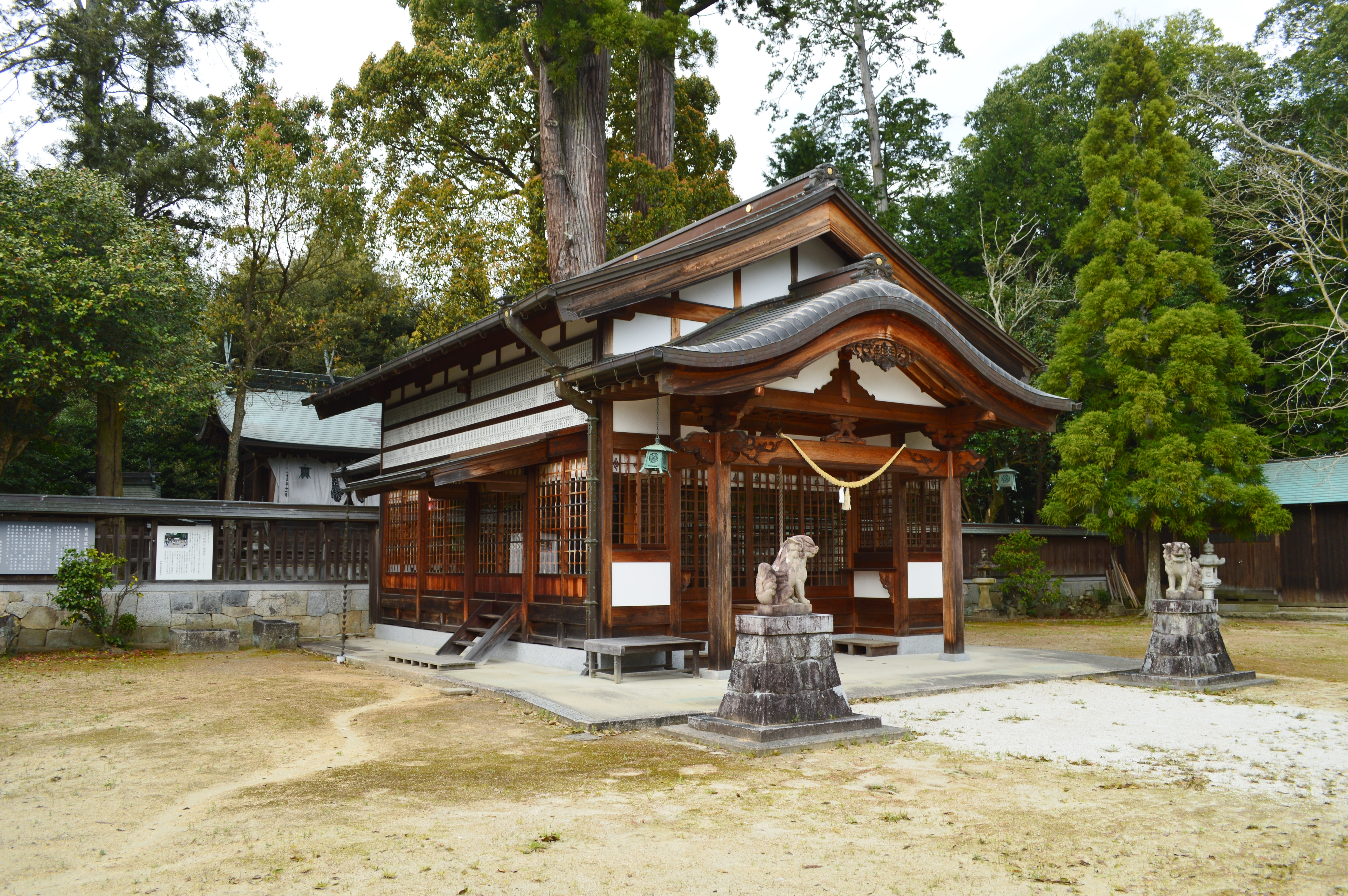 比自岐神社 社殿 Nikon D3200